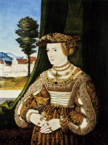 Tochter von Herzog Albrecht IV. von Bayern, Enkelin von Friedrich III., Kaiser des Heiligen Römischen Reiches